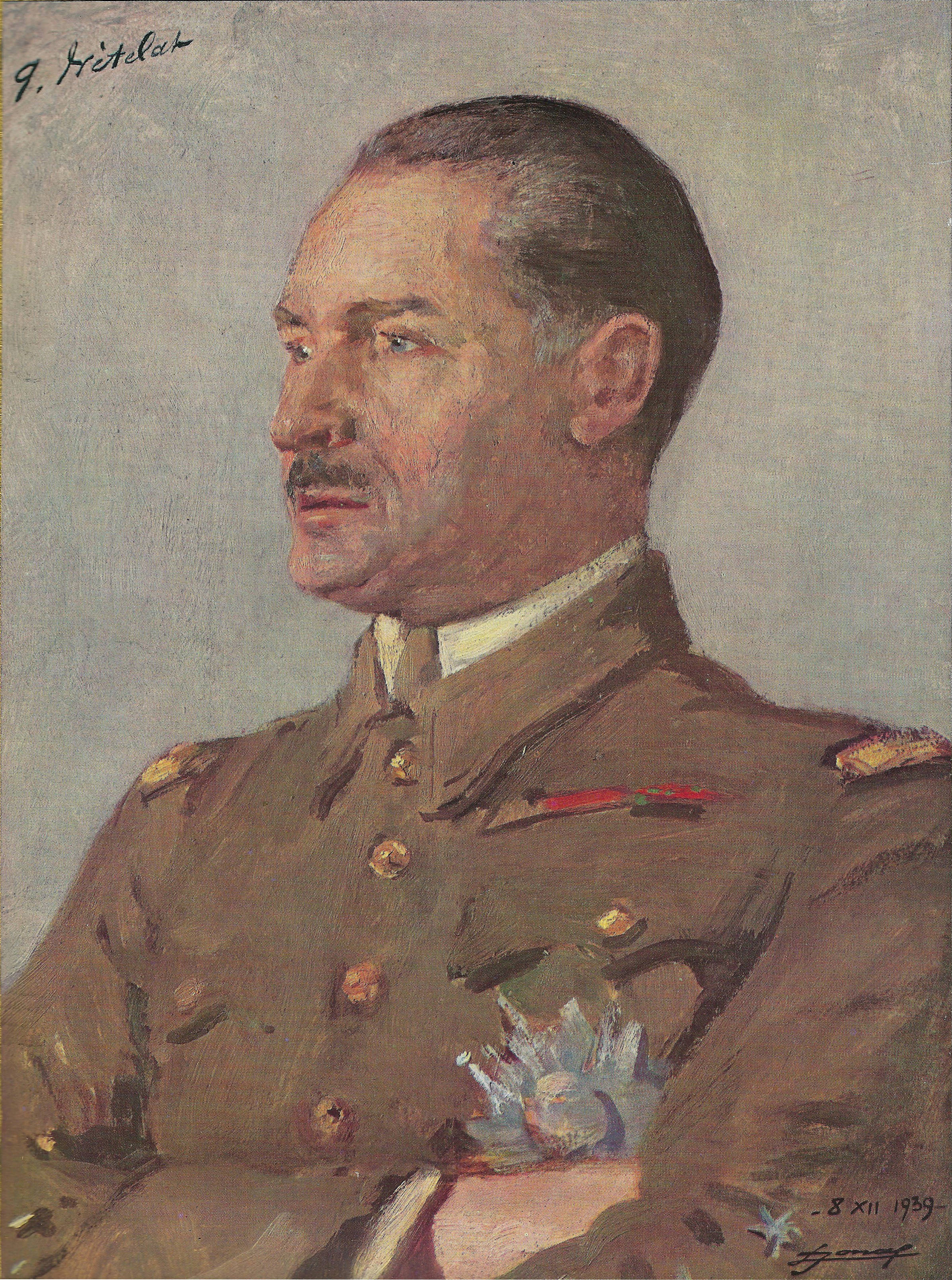 Le général André-Gaston Prételat